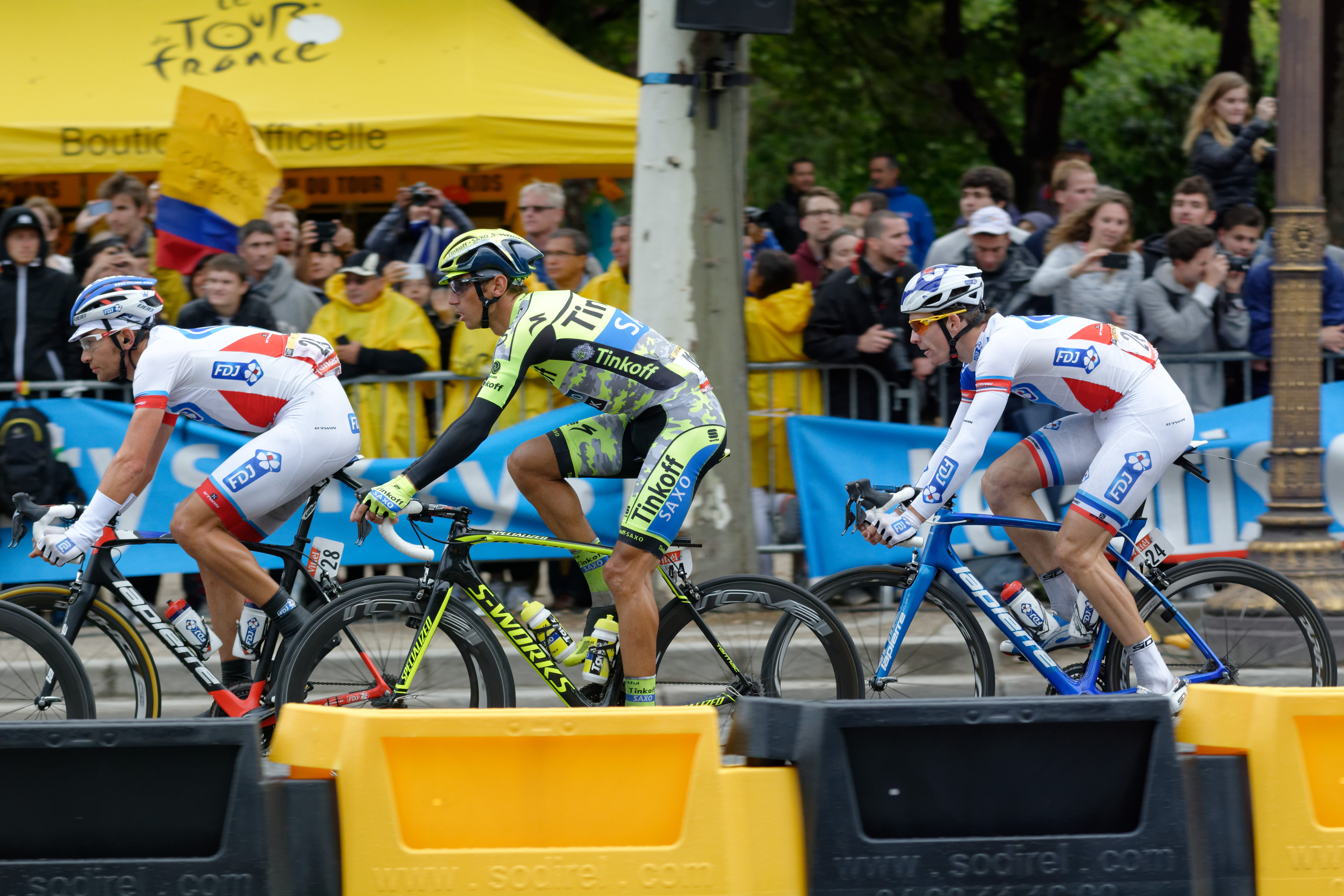 D71_2703_DxO